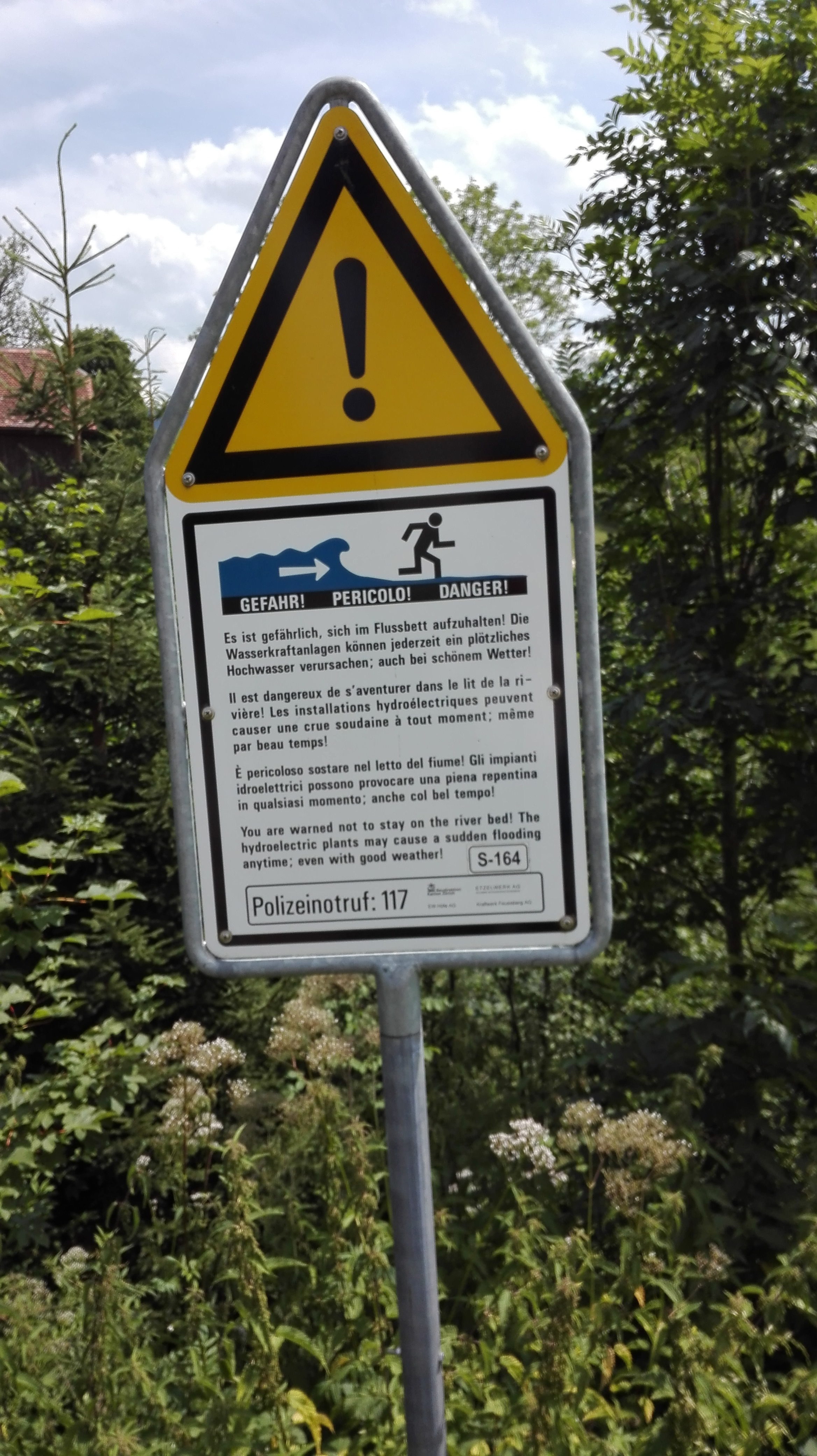 Warnung vor Schwallwasser (Überflutung eines Gebietes durch Karaftwerkbetreiber)